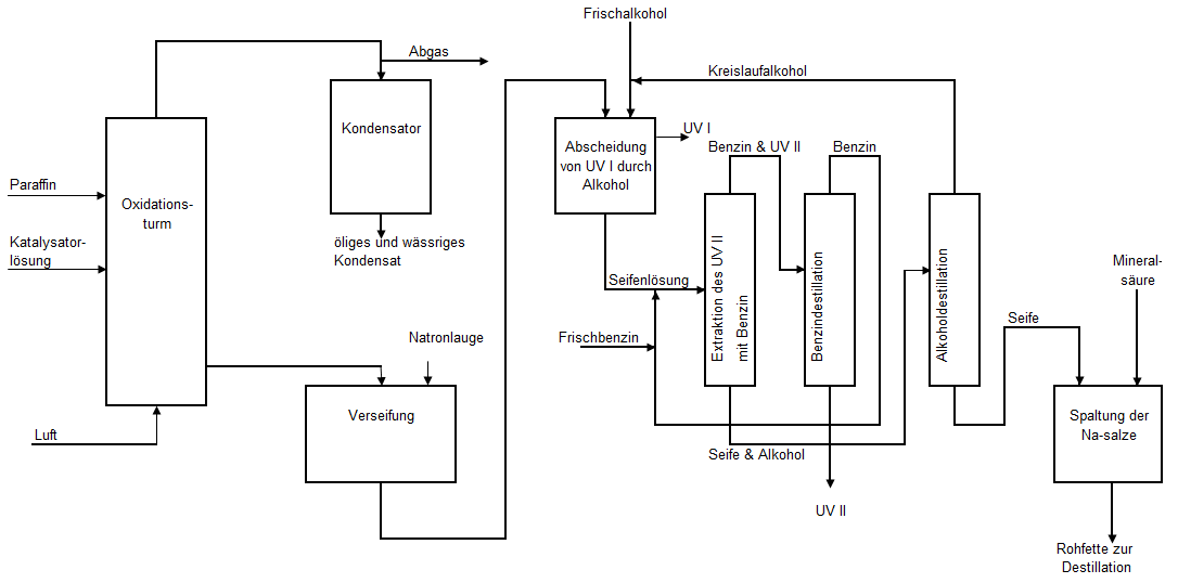 Paraffinoxidation nach Asinger, Einführung in die Petrolchemie